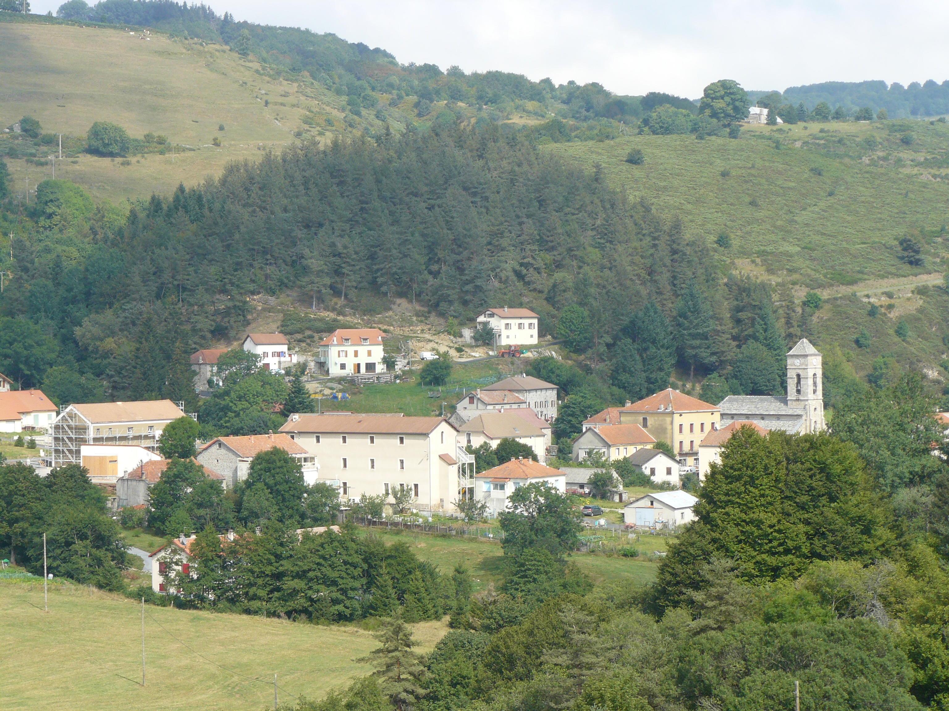 Vue du village depuis les hauteurs.